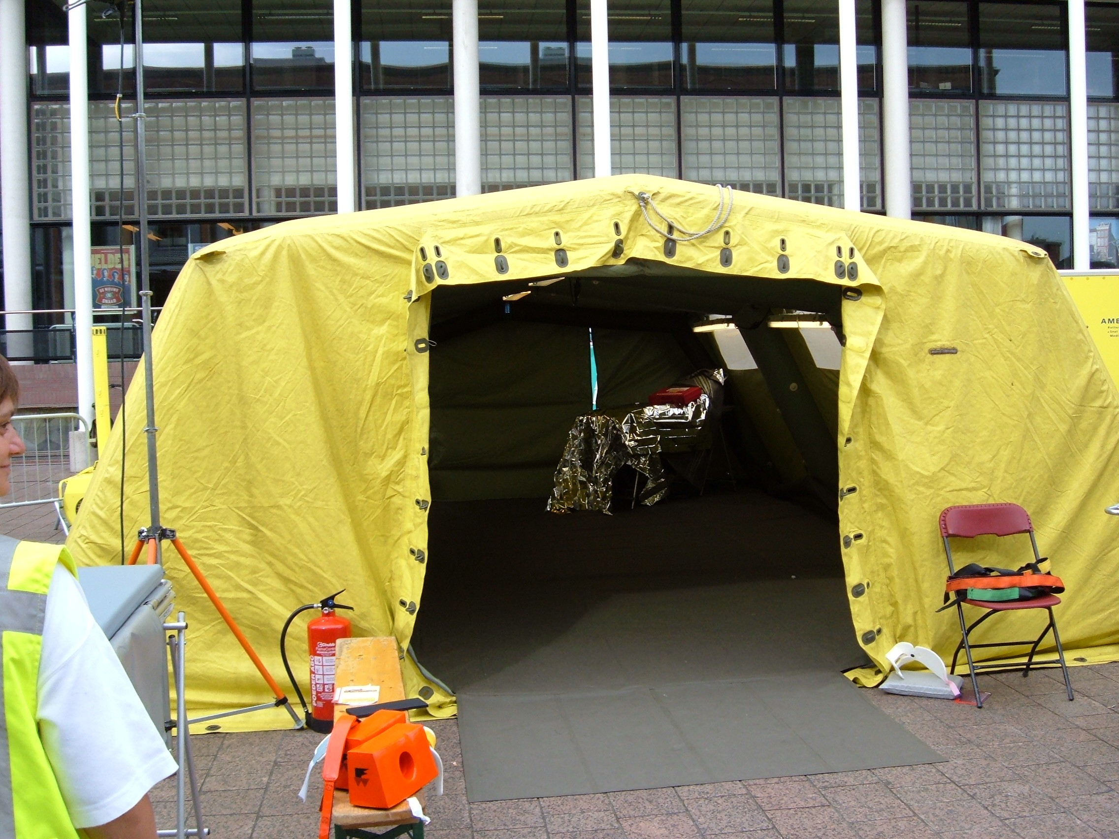 Trell teng Geneeskundige Combinatie Nieuwe Waterweg Noord